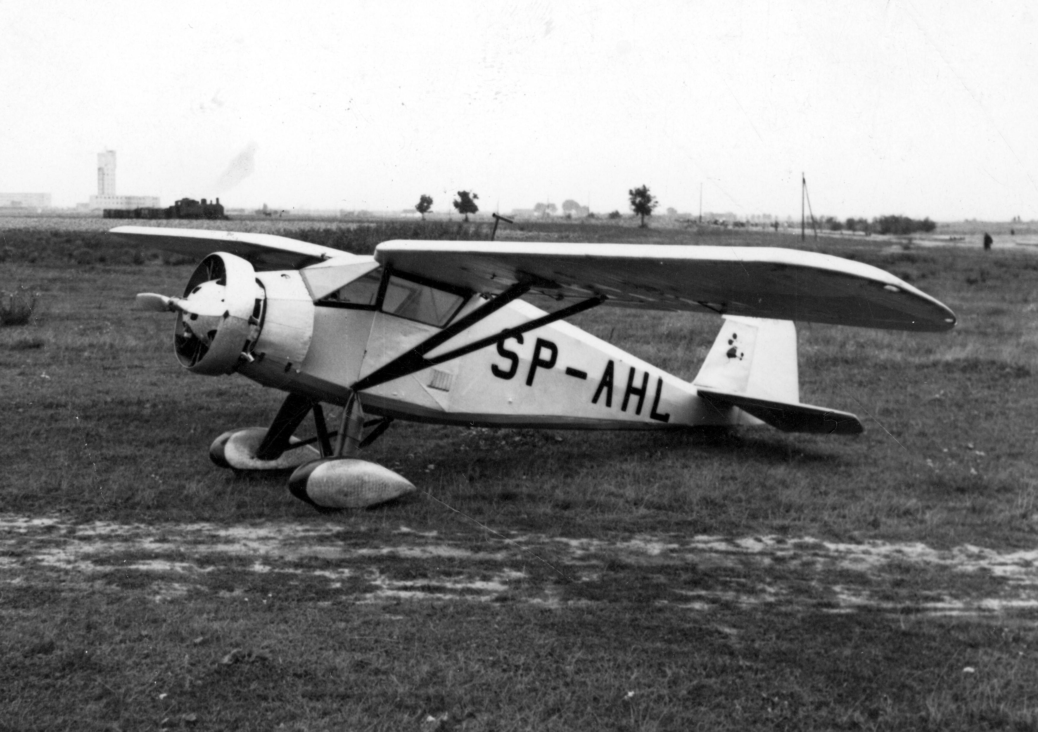 Samolot RWD 6 zbudowany w Doświadczalnych Warsztatach Lotniczych w Warszawie, Okęcie - Lotnisko na lotnisku. Samolot SP-AHL zajął 9. miejsce na zawodach Challenge 1932.